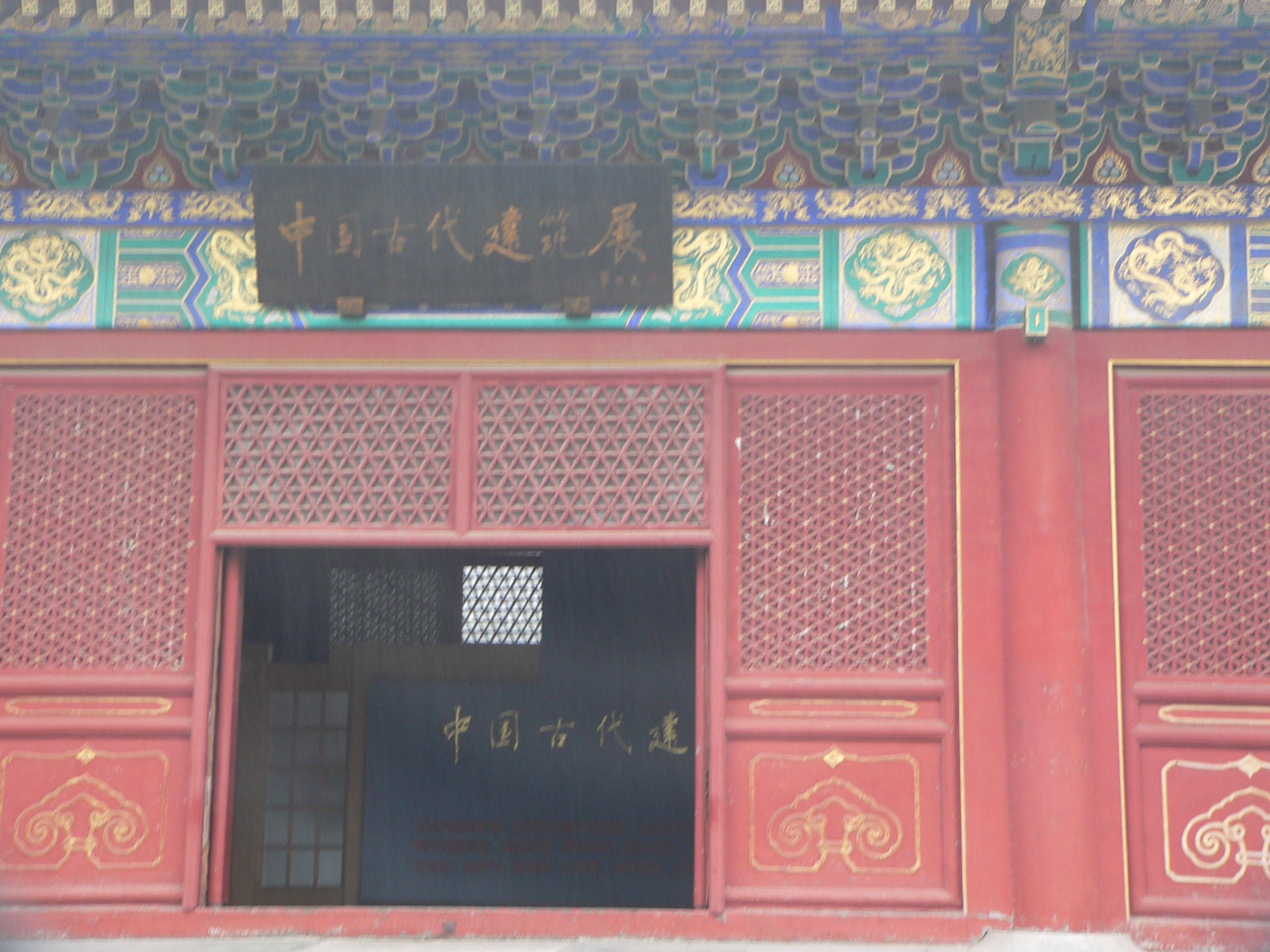 北京先农坛中太岁殿院内办的中国古代建筑展 拍摄